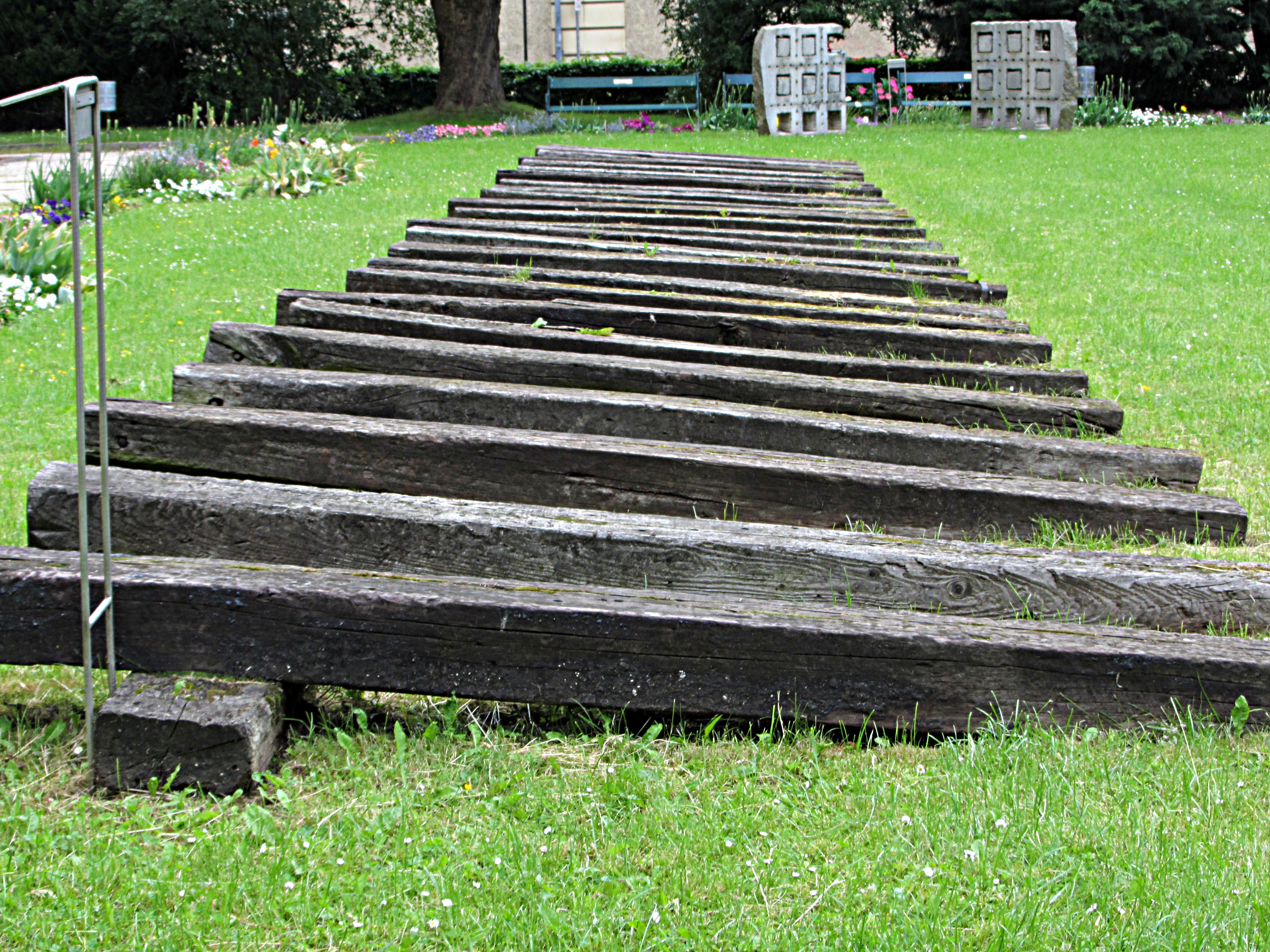 Museumspark: "Bone Chaser"